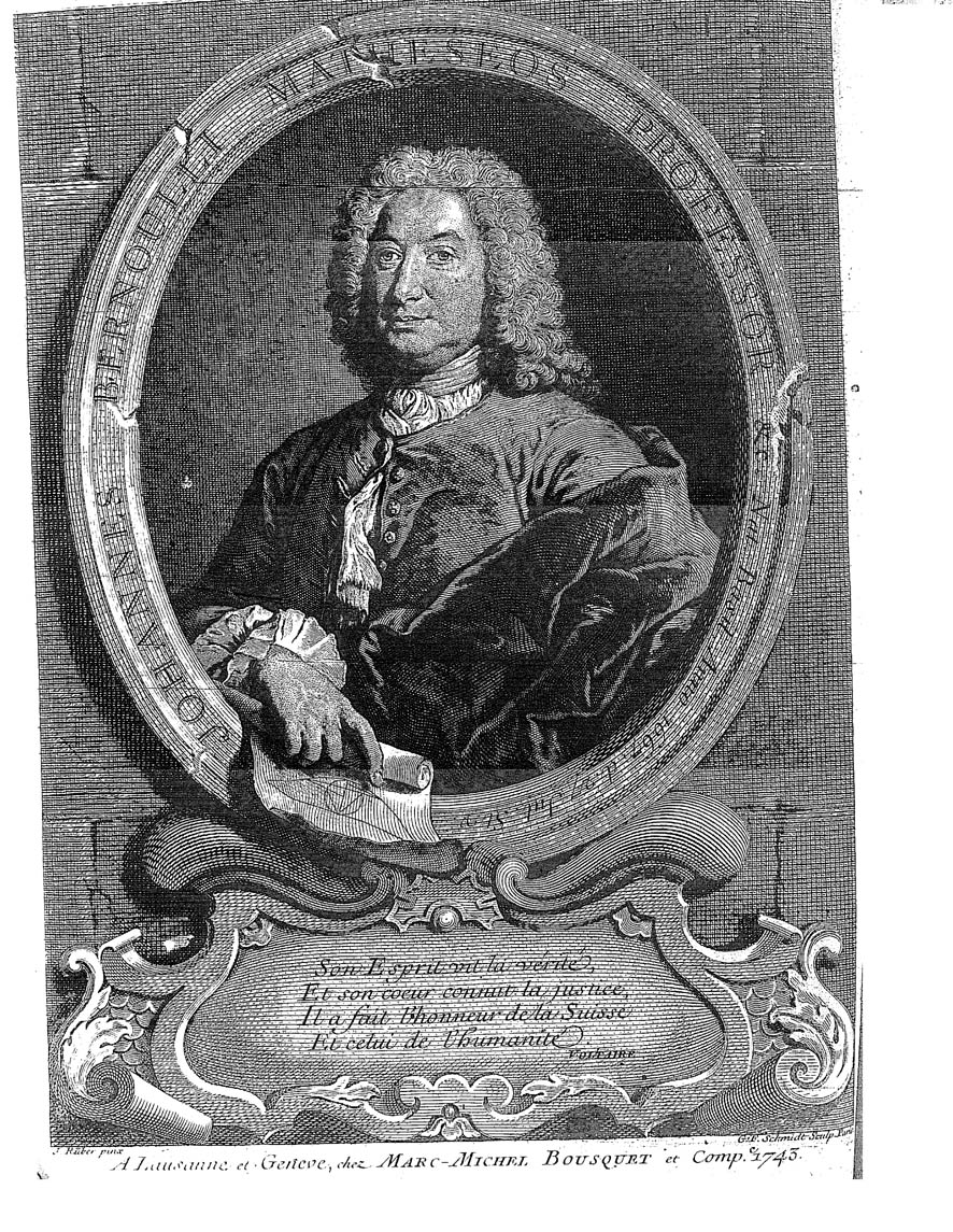 Tomus primus quo continentur ea quae ab anno 1690 ad annum 1713 prodierunt. - Lausannae & Genevae : sumptibus Marci-Michaelis Bousquet & sociorum, 1742. - [6], XXIV, 563, [1] p., XXIII c. di tav. .